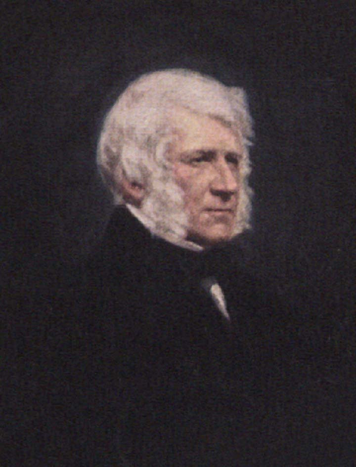 Беларуская (тарашкевіца): Партрэт Яўстаха Каятана Сапегі (Jaŭstach Kajatan Sapieha), паўстанца і дзеяча эміграцыі